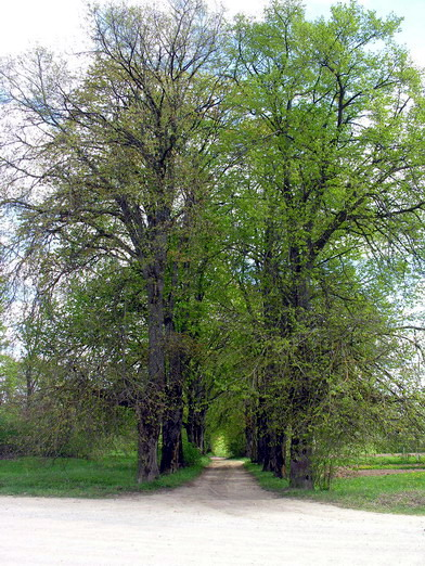 Ritinė, alėja į buvusią dvarvietę. Foto: Algirdas, 2006 m. gegužės 17 d.